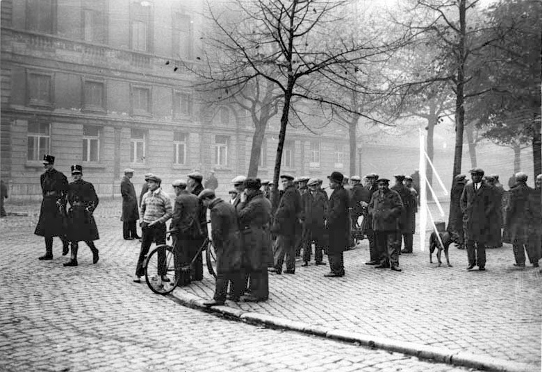 Stakers bij de Sphinx aardewerkfabriek in de Boschstraat in Maastricht in november 1933. Fotocollectie RHCL Maastricht, GAM 11534.